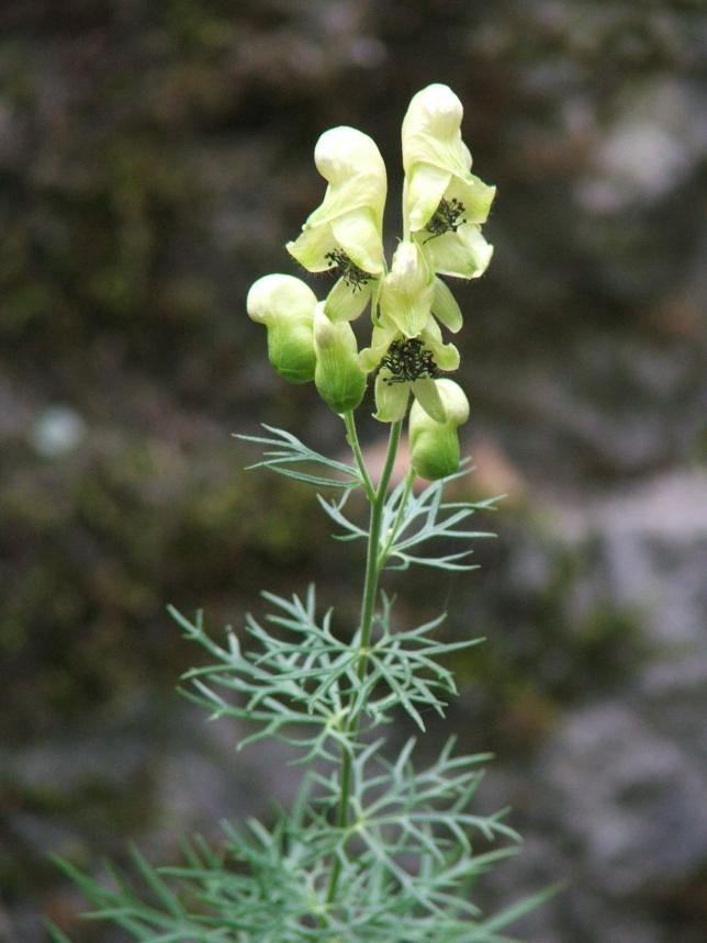 Aconitum anthora (sisakvirág)